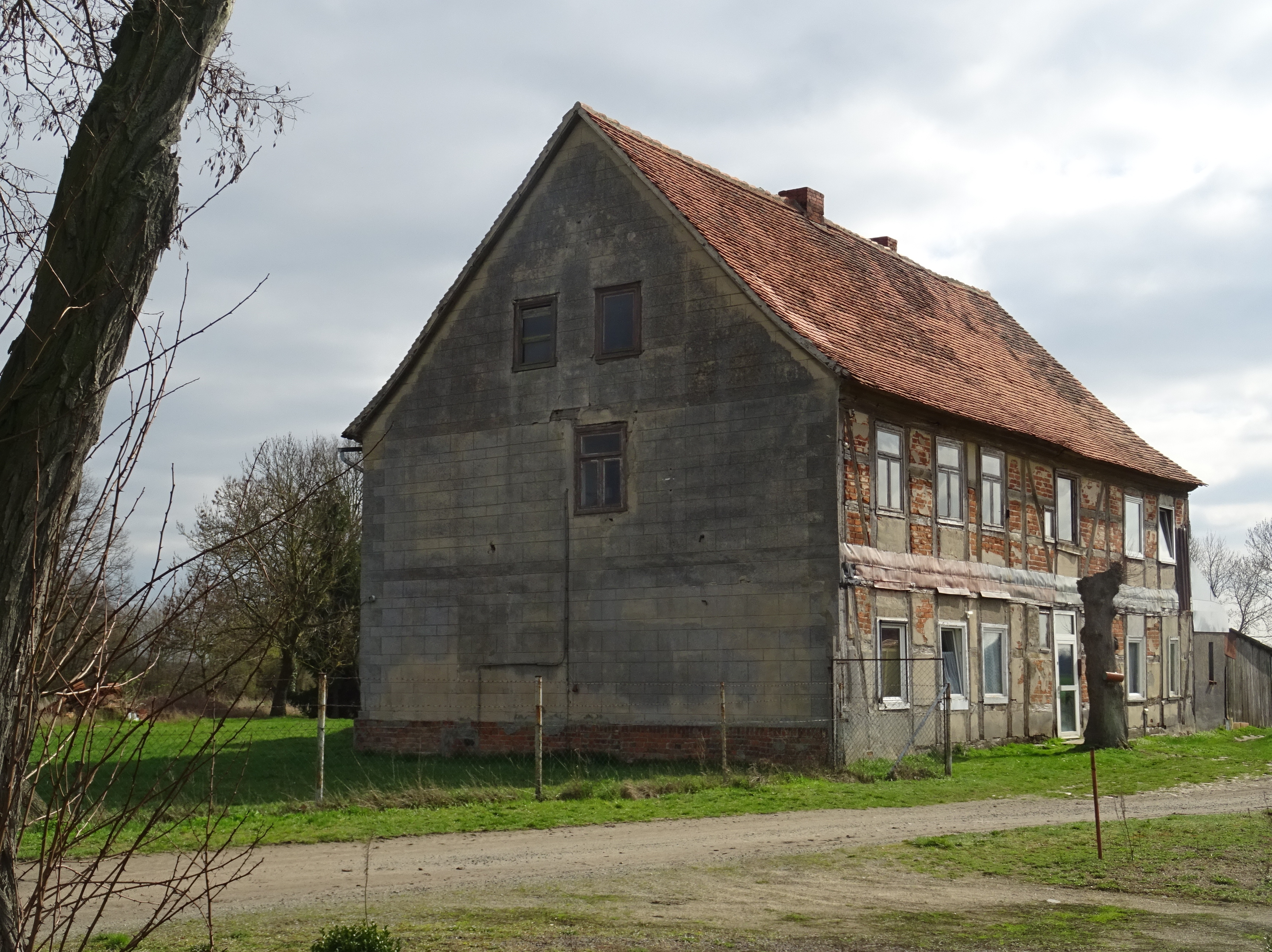 Schönberg, Stadt Seehausen (Altmark), denkmalgeschütztes Wohnhaus Dammstraße 12